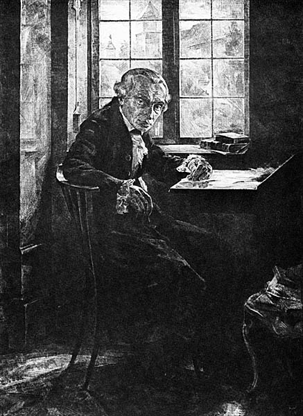 Kant im Arbeitszimmer